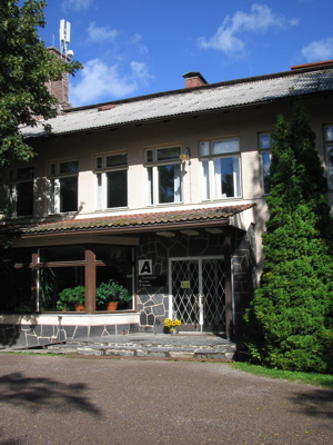 Seurakuntaopiston päärakennus Järvenpäässä.